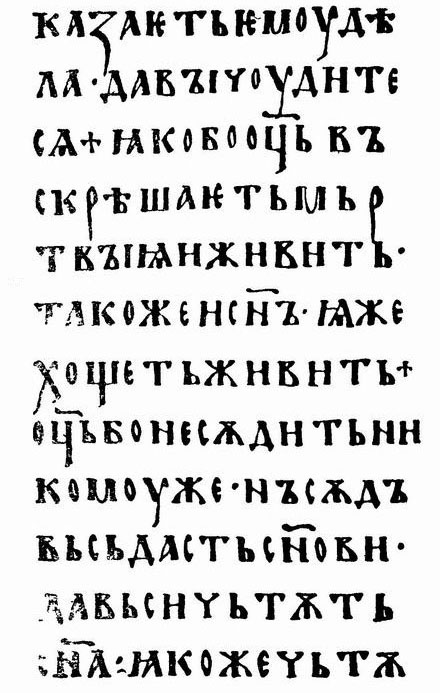 Ostromir Gospel